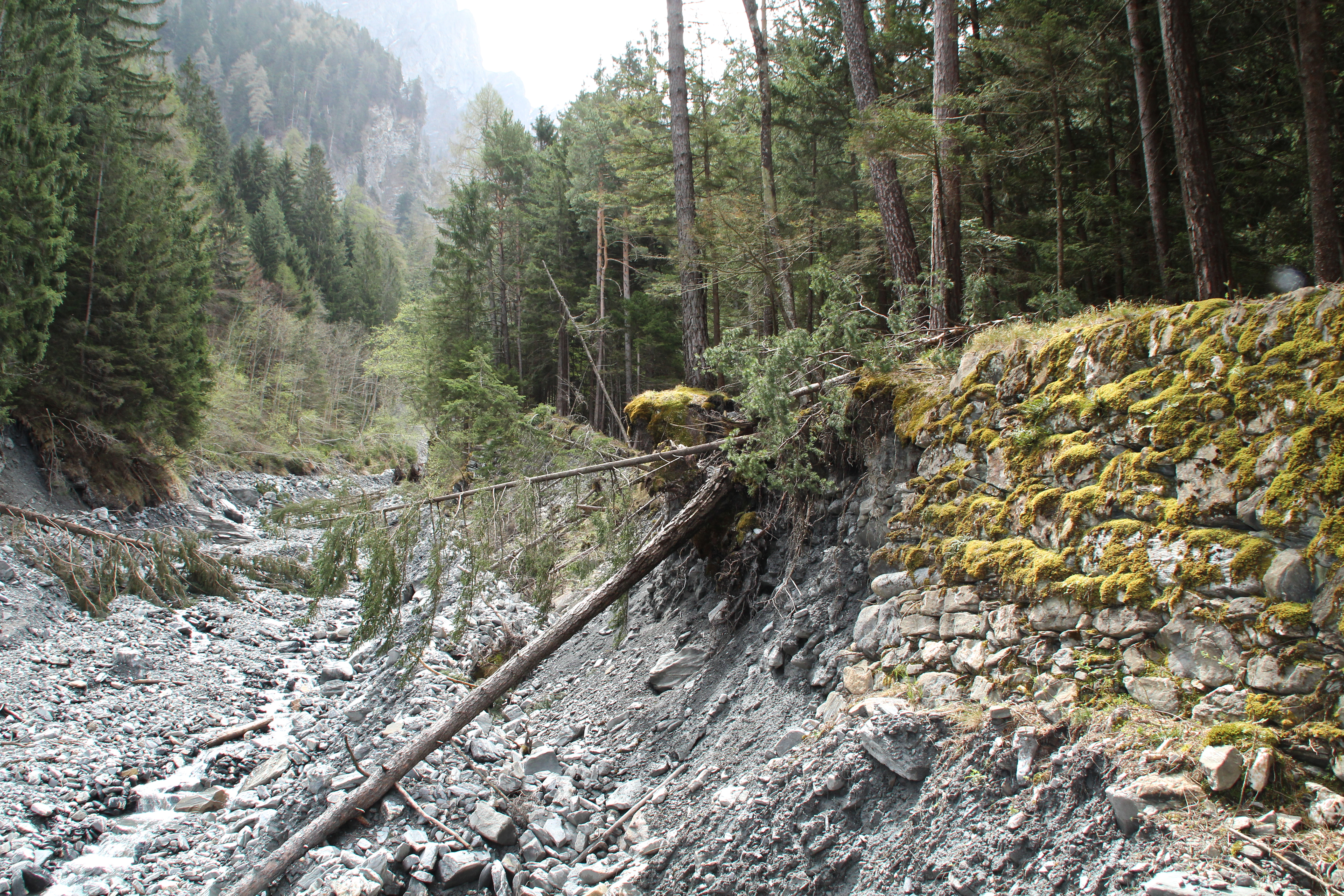 Scaläratobel